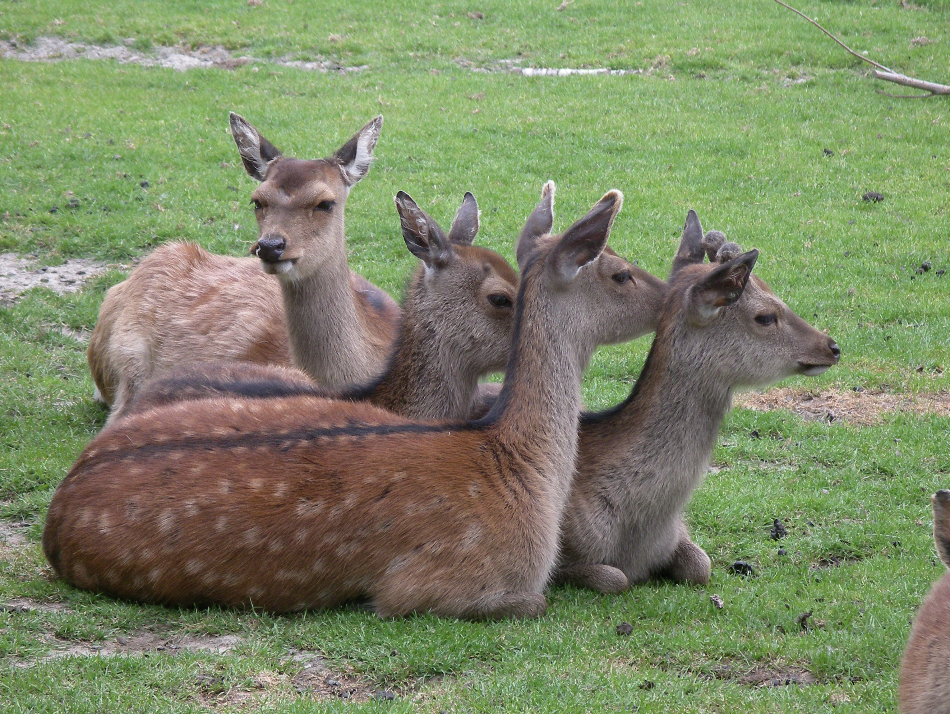 Van Blanckendaell Park, Tuitjenhorn, The Netherlands